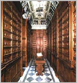 Borgosiepi, Abbazia SS. Trinità Cava de' Tirreni, Sala Biblioteca